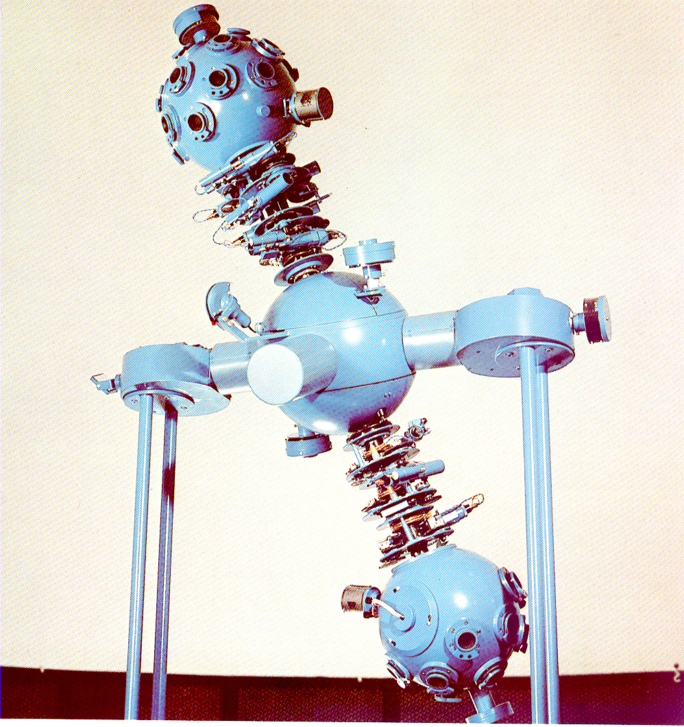 Planétarium Zeiss ZKP2